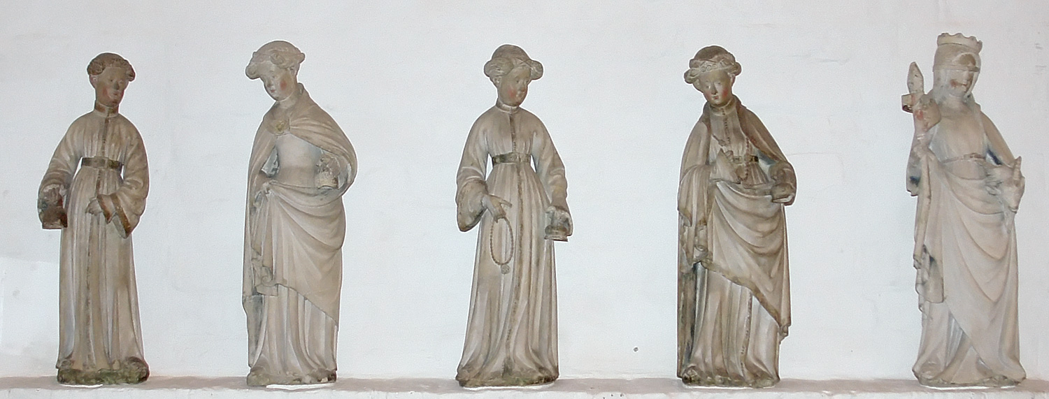 St.-Annen-Kloster Lübeck: Die Törichten Jungfrauen, angeführt durch die Personifikation der Synagoge. Aus der Burgkirche in Lübeck, Sandstein, Flandern um 1400. Eine Figur ist verloren.